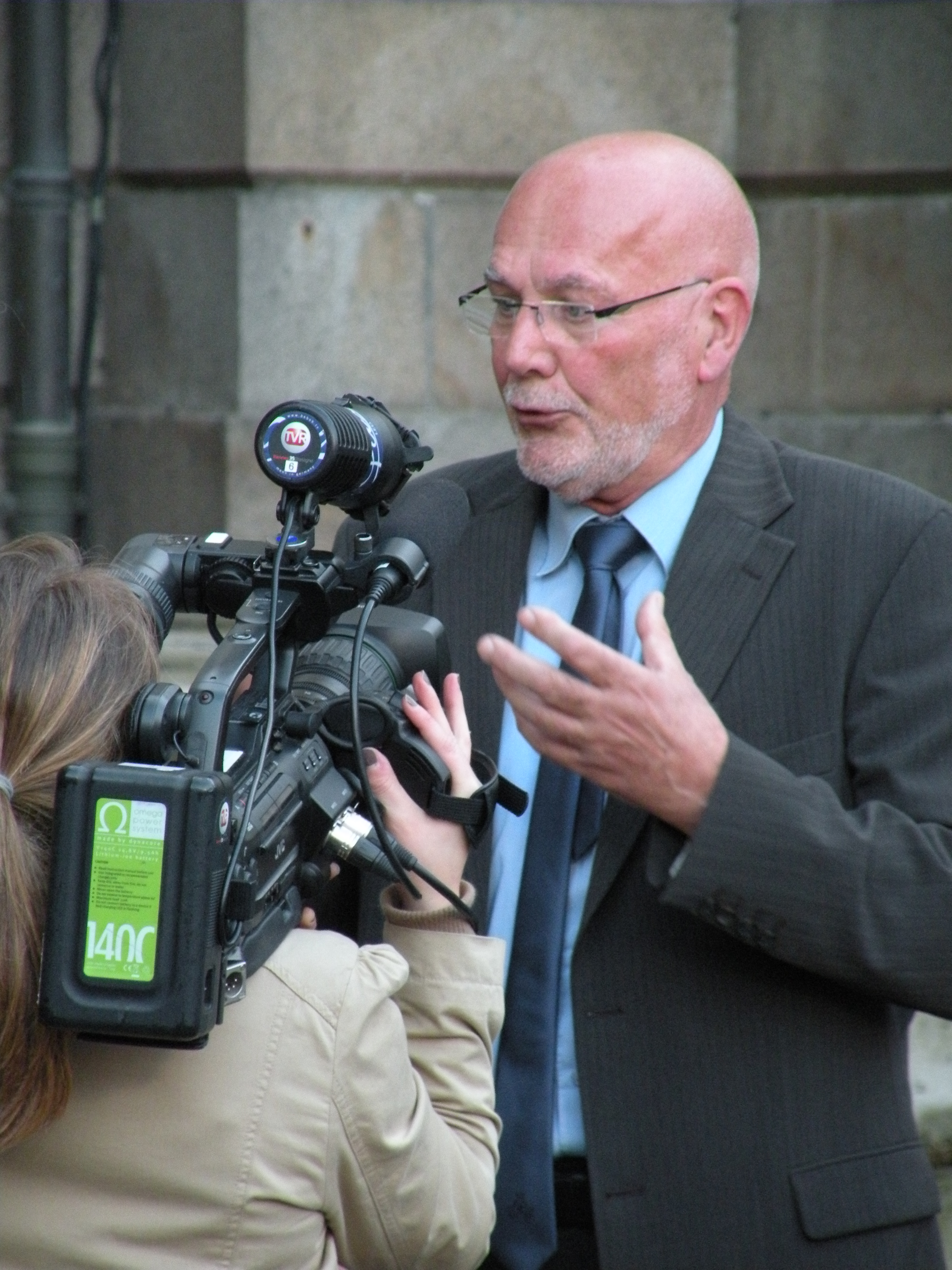 Jean-Louis Tourenne sur la place de la Mairie à Rennes, le 6 mai 2012 à l'occasion de l'élection de François Hollande.